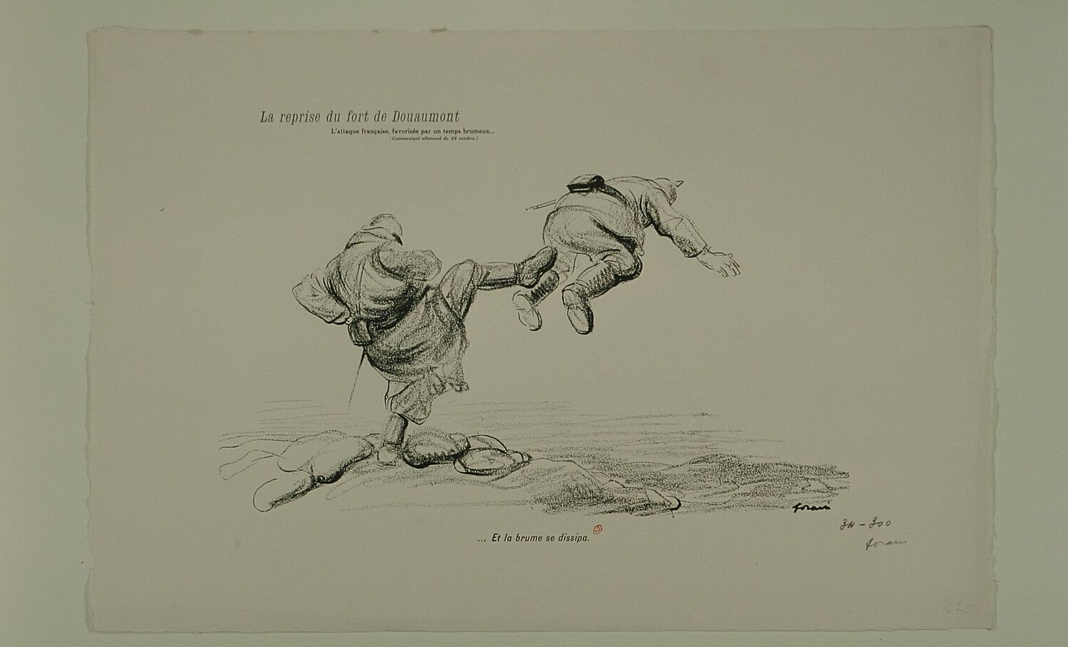 Caricature représentant « la reprise du fort de Douaumont : L'attaque française, favorisée par un temps brumeux... (communiqué allemand du 26 octobre) Et la brume se dissipa. » Lithographie sur papier, 22 x 40 cm, publiée dans Le Figaro du 12 novembre 1916 ( Conservée à la Bibliothèque de l'Institut national d'histoire de l'art.